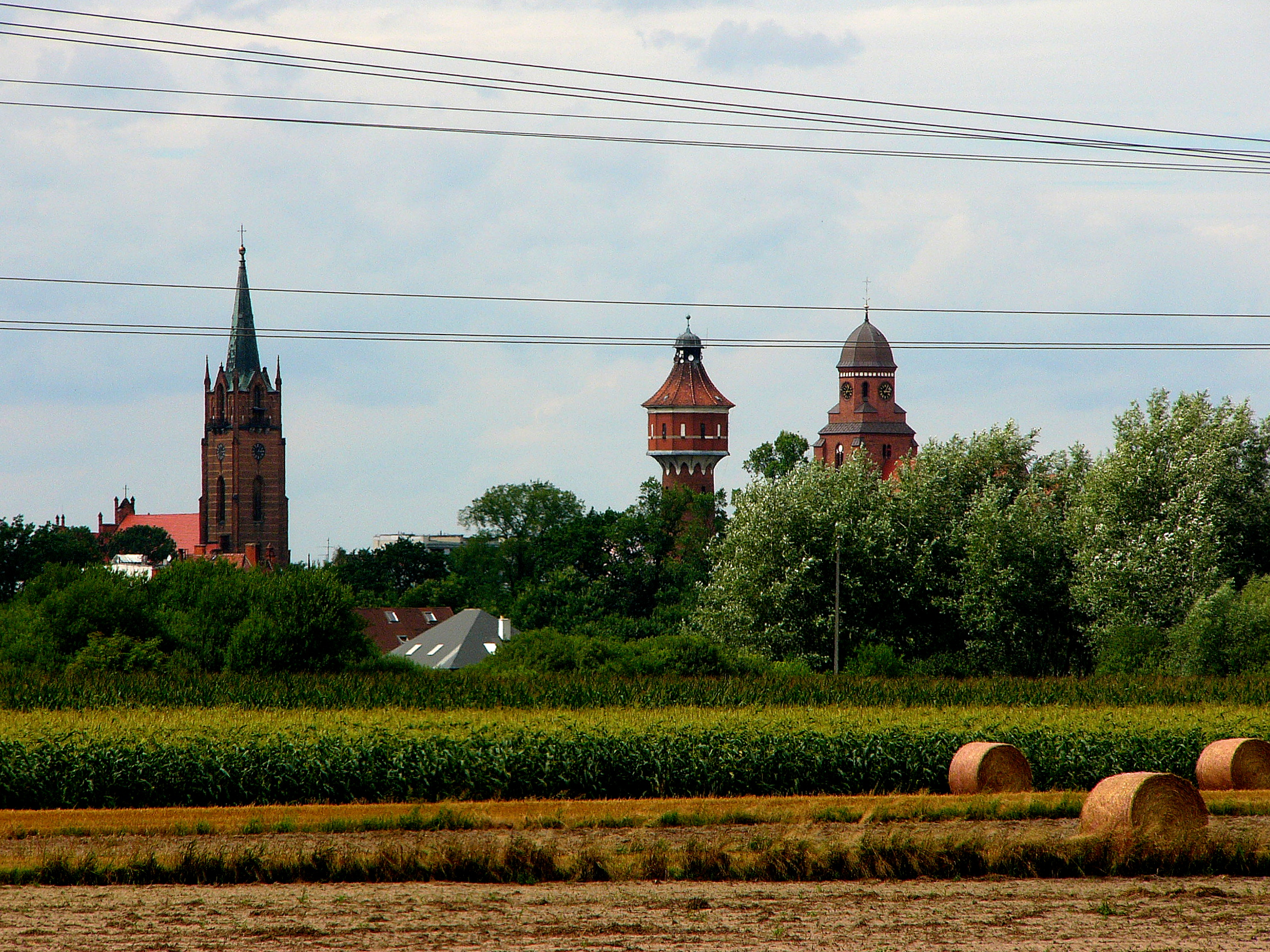 Żmigród, ośrodek historyczny miasta Wikidata has entry 597992 with data related to this item.